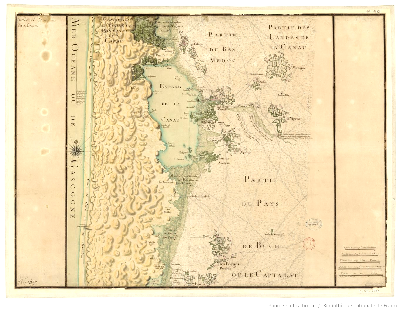 Claude Masse (1652-1737) , carte de l'estang de La Canau, 1700-1724